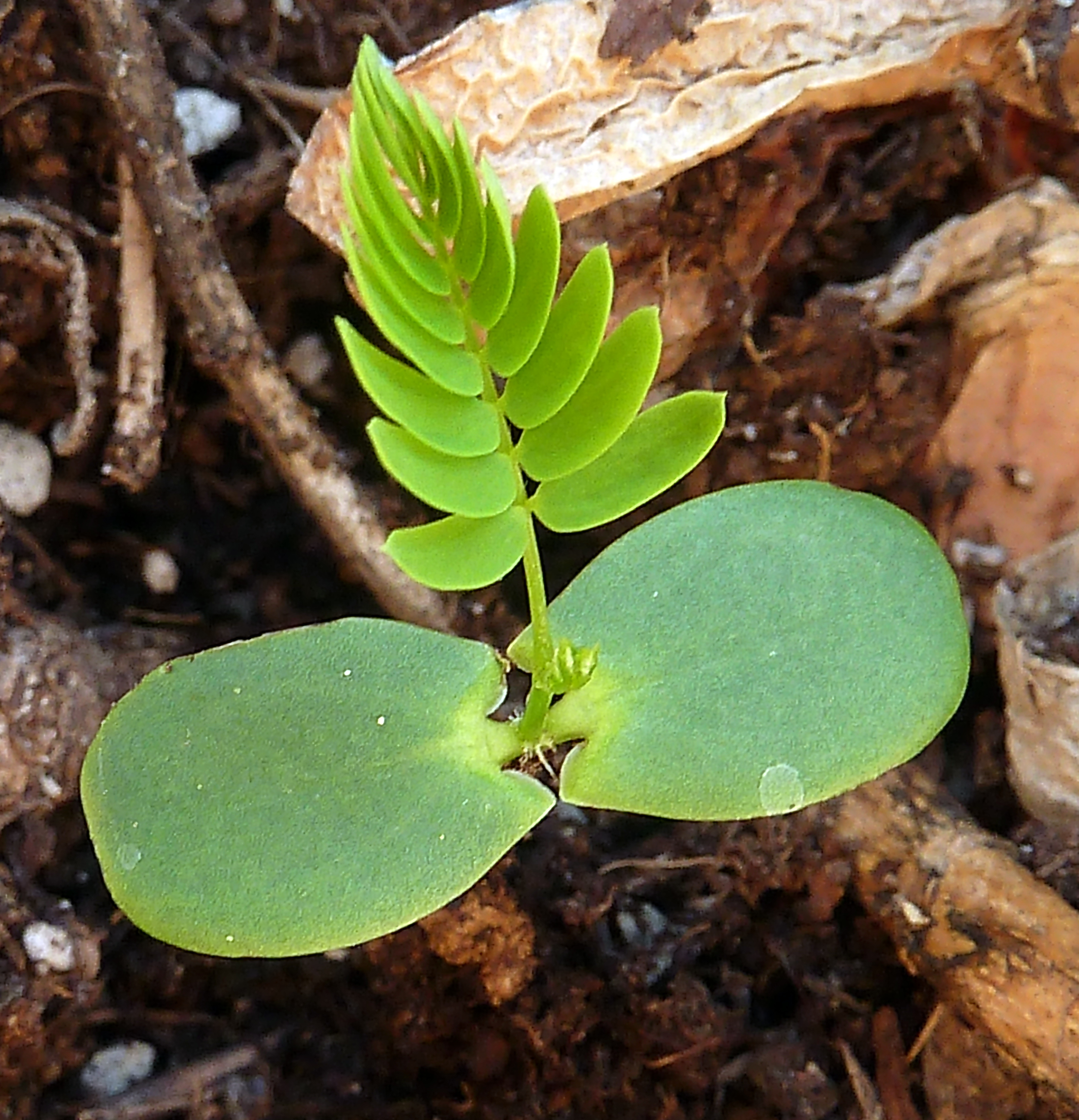 Leucaena leucocephala : Plántula con los dos cotiledones y las hojas primordiales - Águilas (Murcia, España).